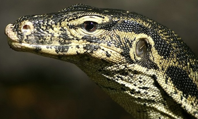 Aufgenommen mit einer Canon EOS 300D im Landauer Reptilium. Fotograf/Quelle: Petra Karstedt / Motiv: Bindenwaran (Varanus salvator)